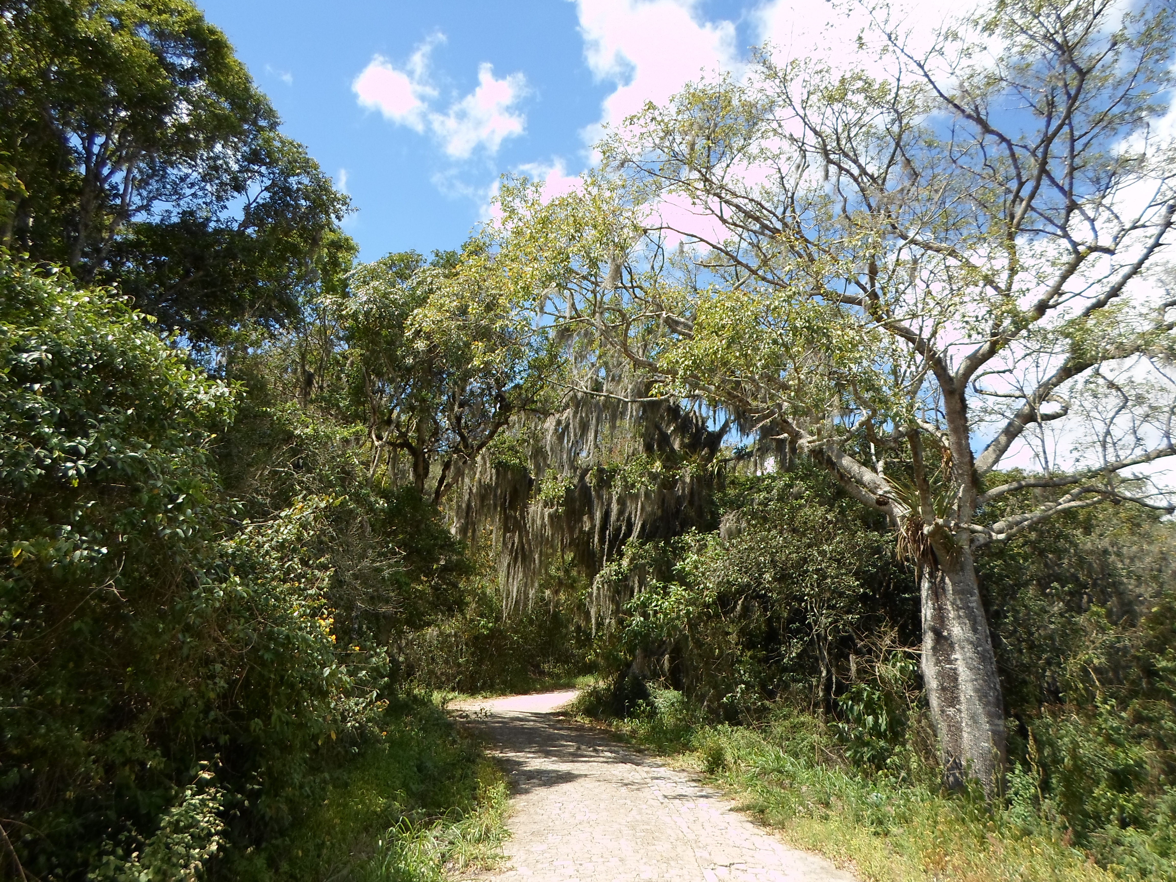 Insira_uma_descrição_para_sua_foto